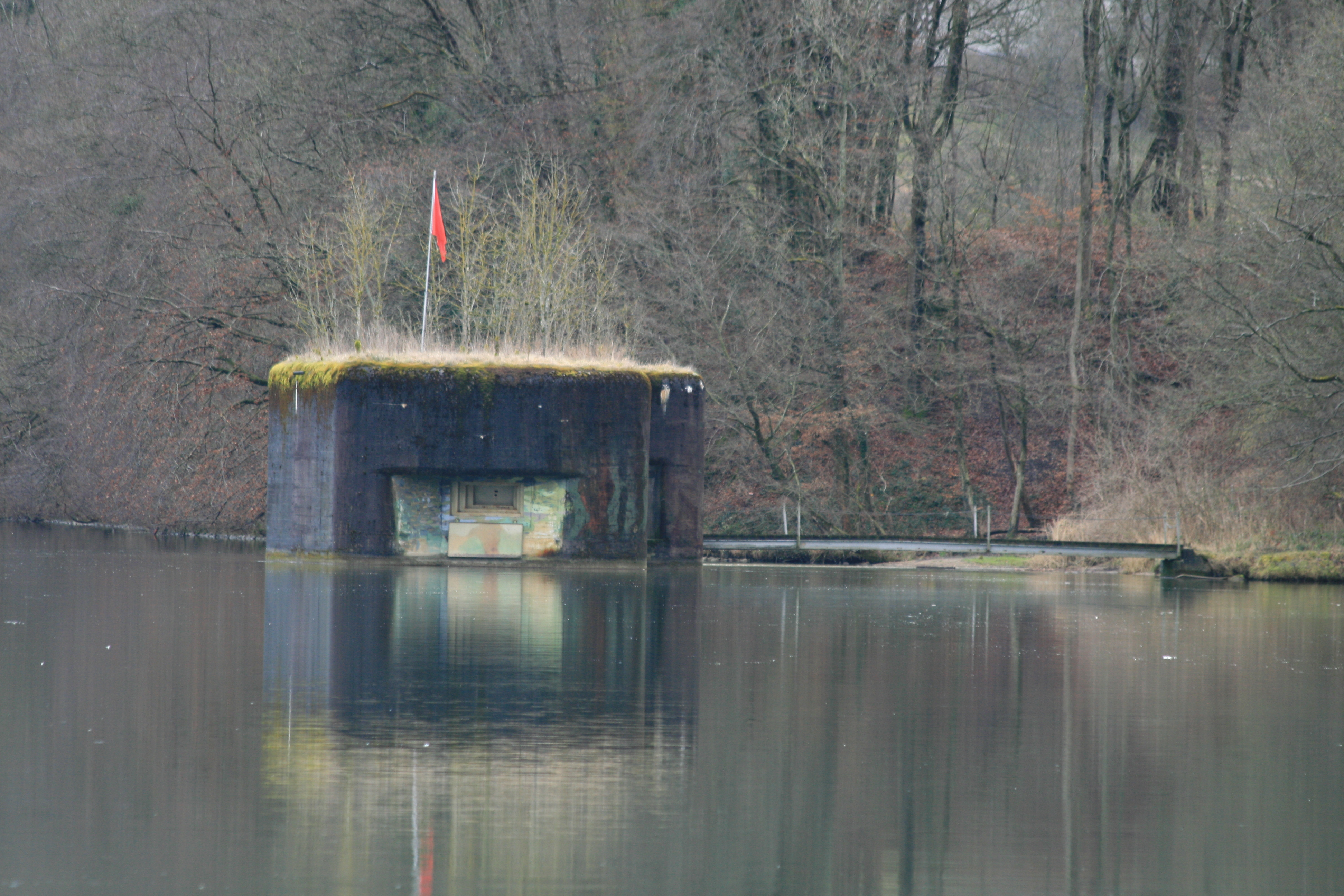 MG-Bunker "Bleiche" am Hochrhein bei Fisibach